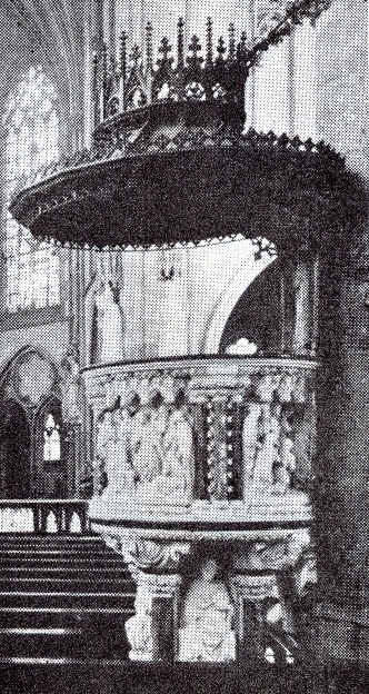 St. Mariä Empfängniskirche in Düsseldorf, 1894 bis 1896, Dombaumeister Ludwig Becker aus Mainz, Kanzel mit Figuren des Bildhauers Anton Josef Reiss.jpg